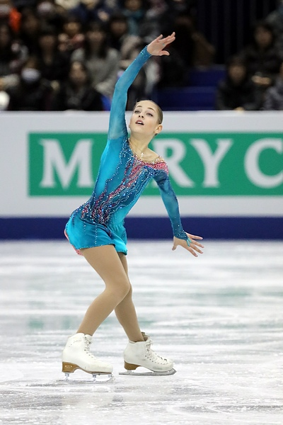 Алёна Косторная (Россия) на финале юниорского Гран-при 2017-2018